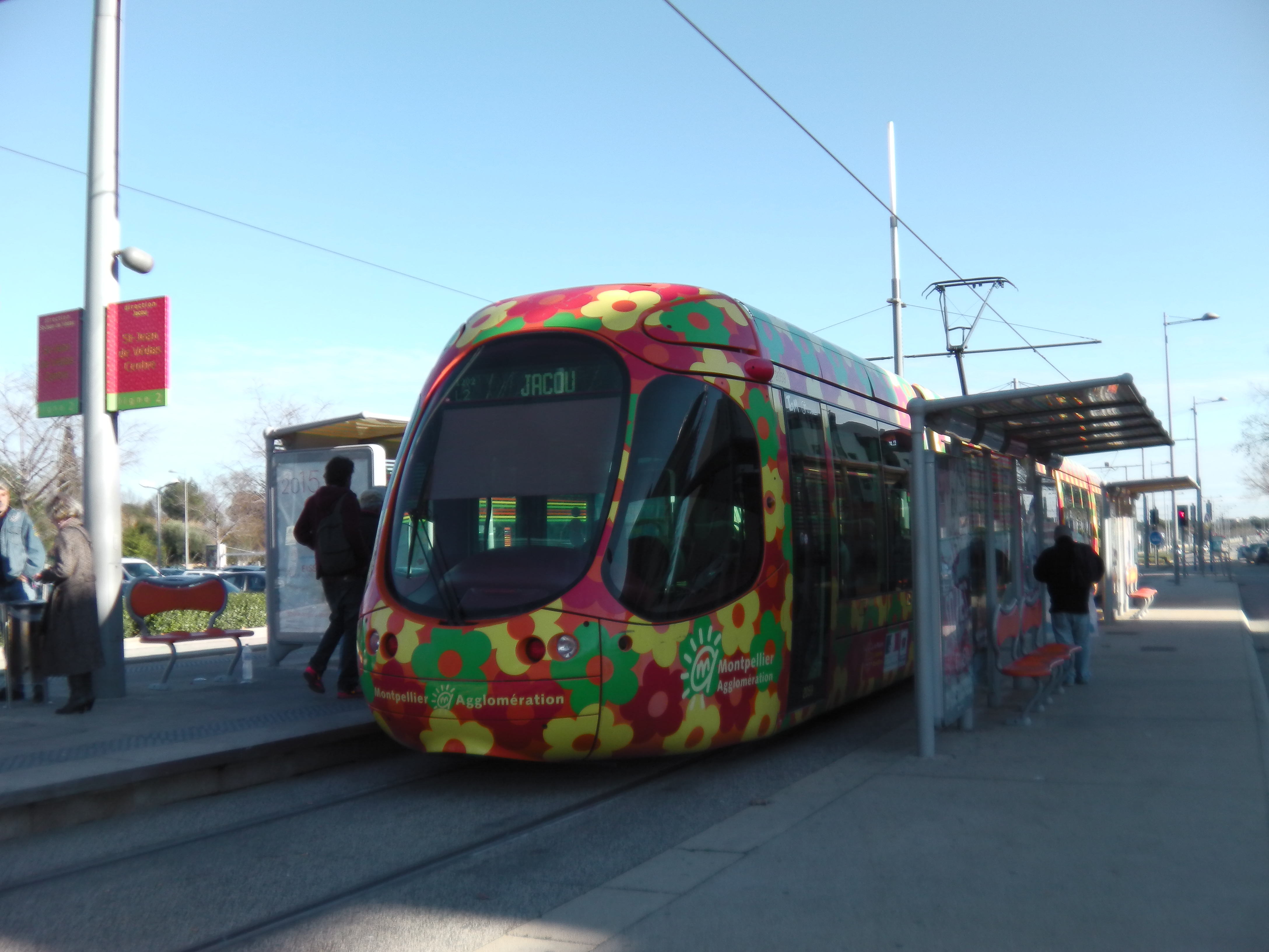 Terminus du Tramway à Saint-Jean-de-Védas (Hérault)